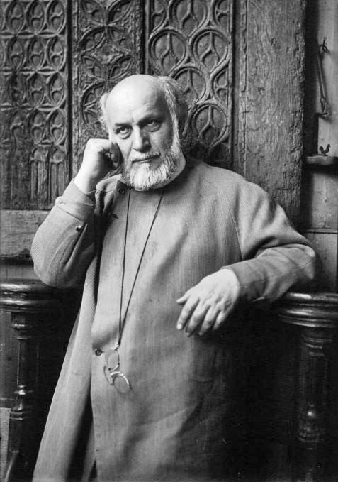 Le sculpteur Bourdelle (portrait) : photographie de presse